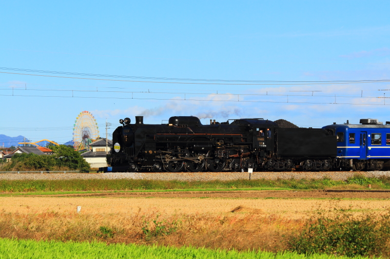 JR両毛線 伊勢崎～駒形 SLシルク両毛号